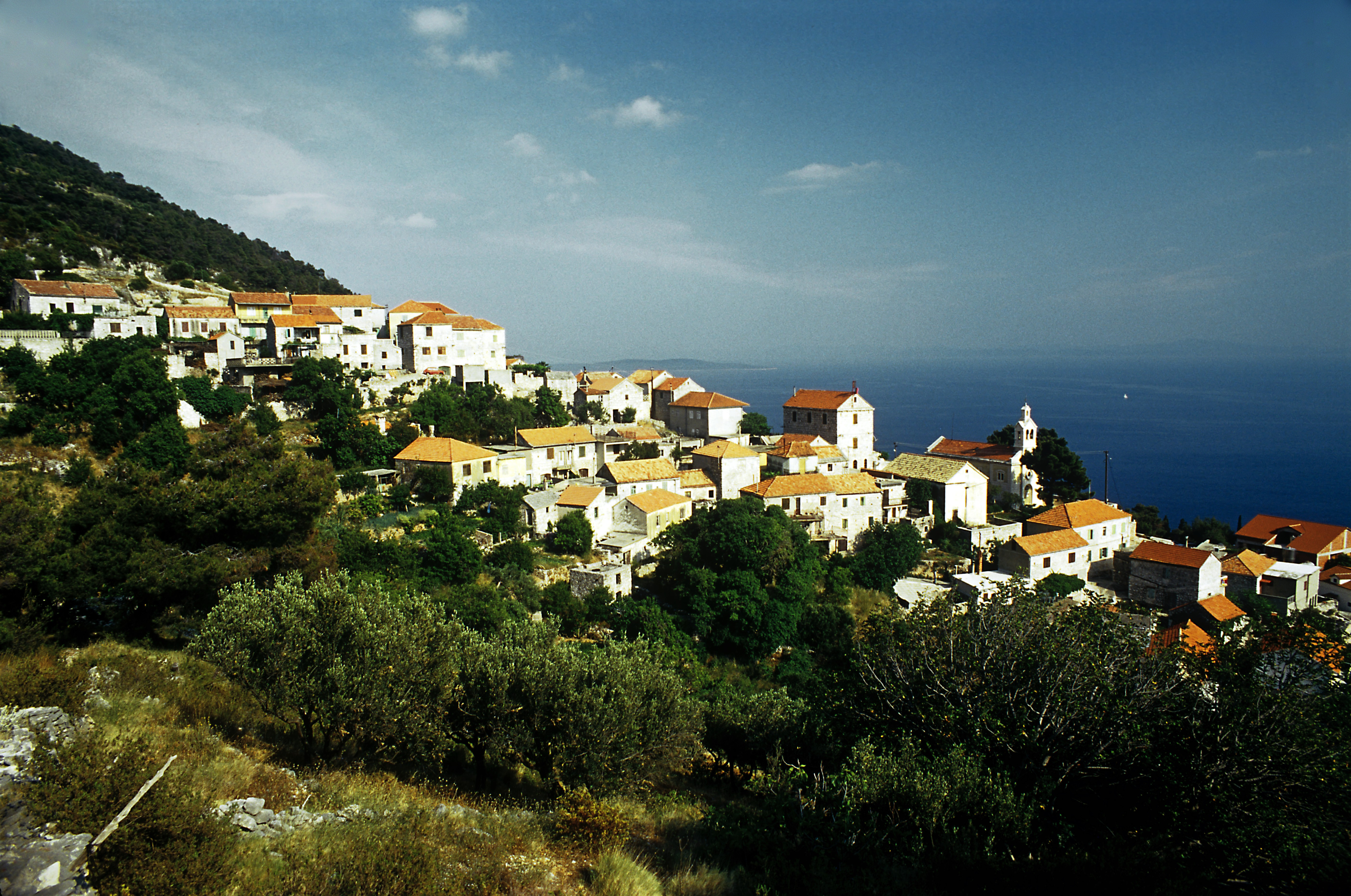 Vom Westen, unterhalb der Kirche St. Spiridon sollte eigentlich die Straße Richtung Dubovica und Hvar-Stadt weiterführen. Beim Konjunktiv blieb es.